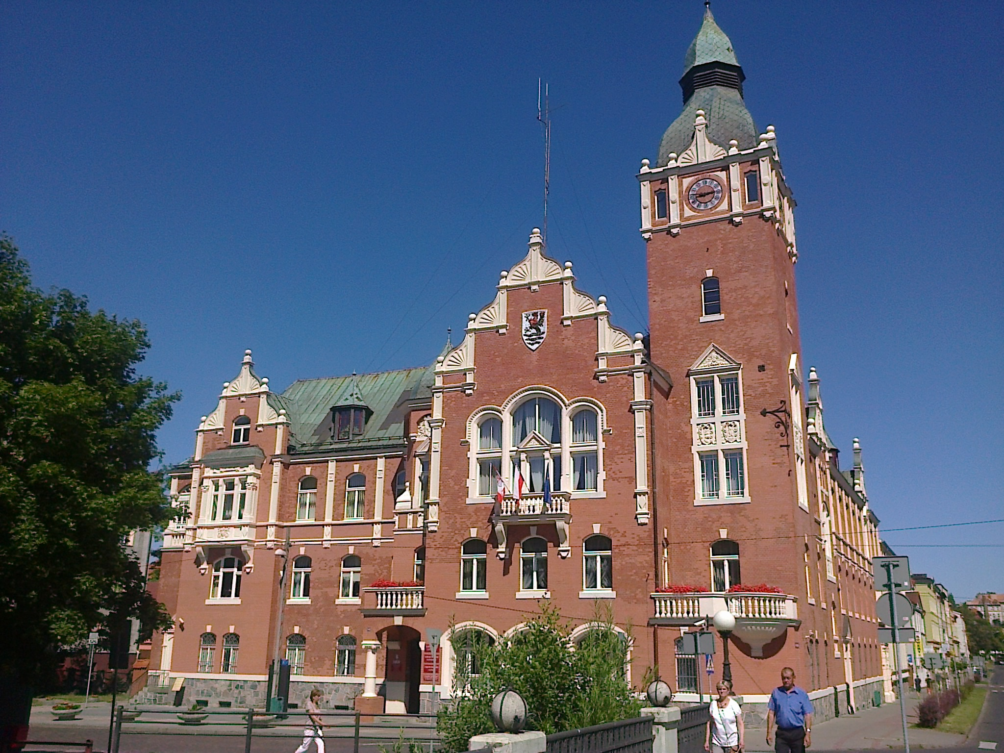 Будівля повітової управи в Слупську